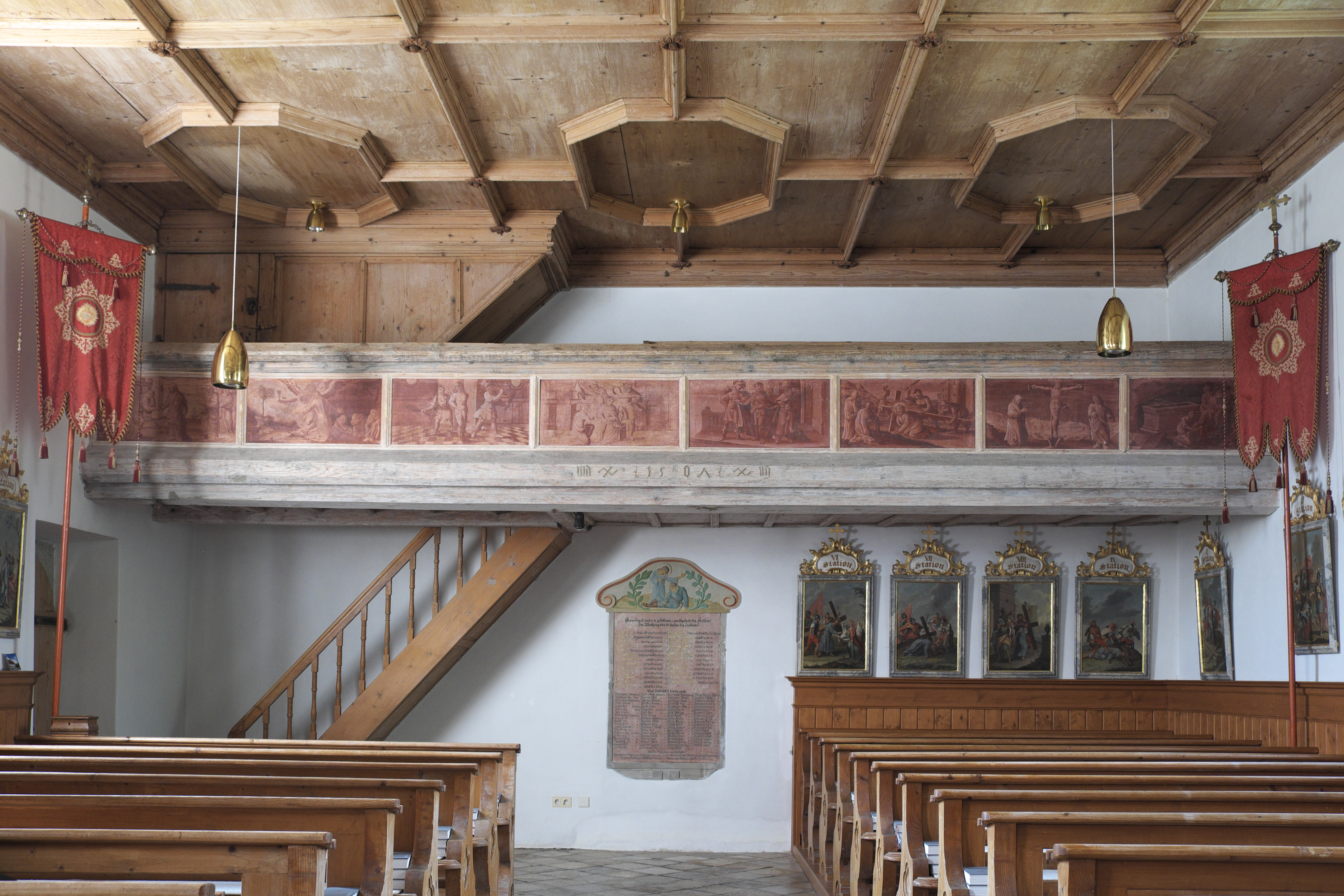 Katholische Filialkirche St. Maria Magdalena in Urspring, einem Ortsteil von Steingaden im Landkreis Weilheim-Schongau (Bayern/Deutschland), Innenraum, Blick zur Westempore